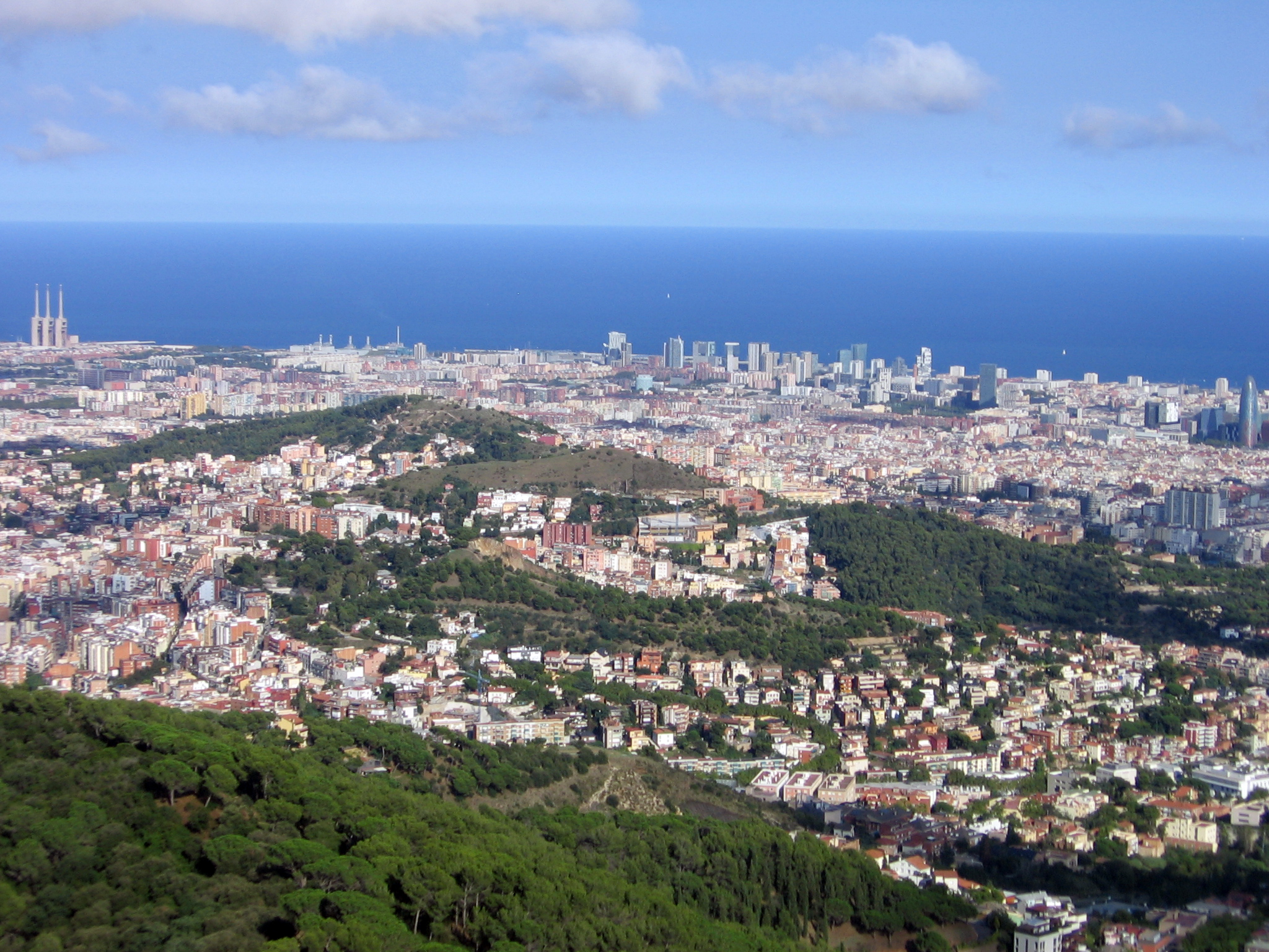 Parque de los Tres Cerros visto desde el Tibidabo.